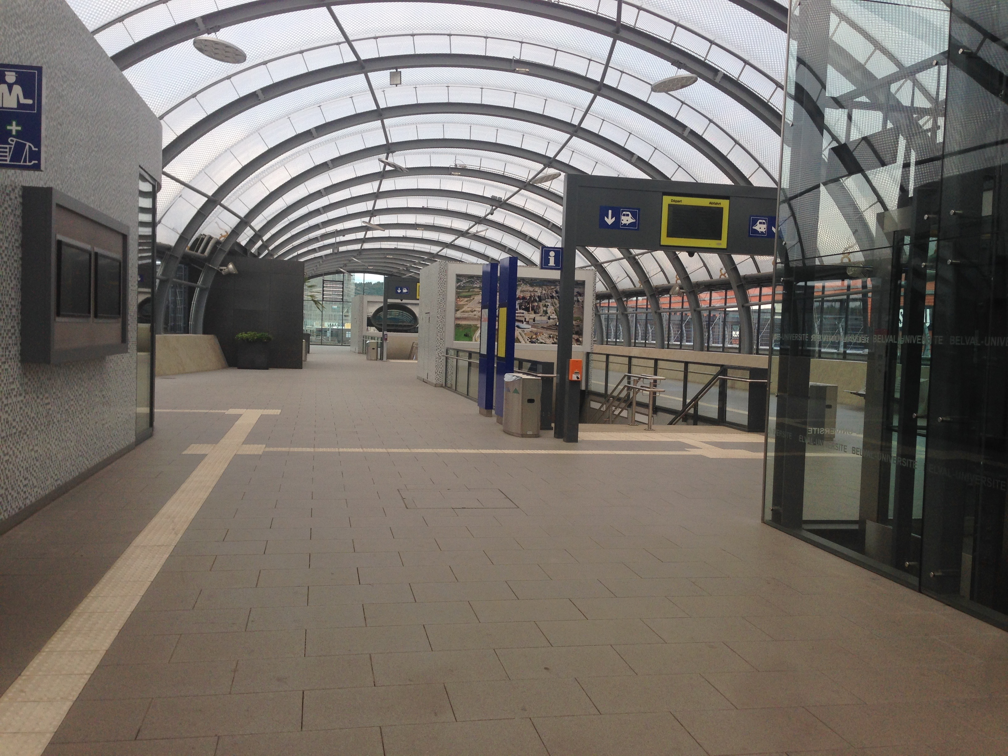 Bahnhof "Universität Belval" in Esch an der Alzette in Luxemburg